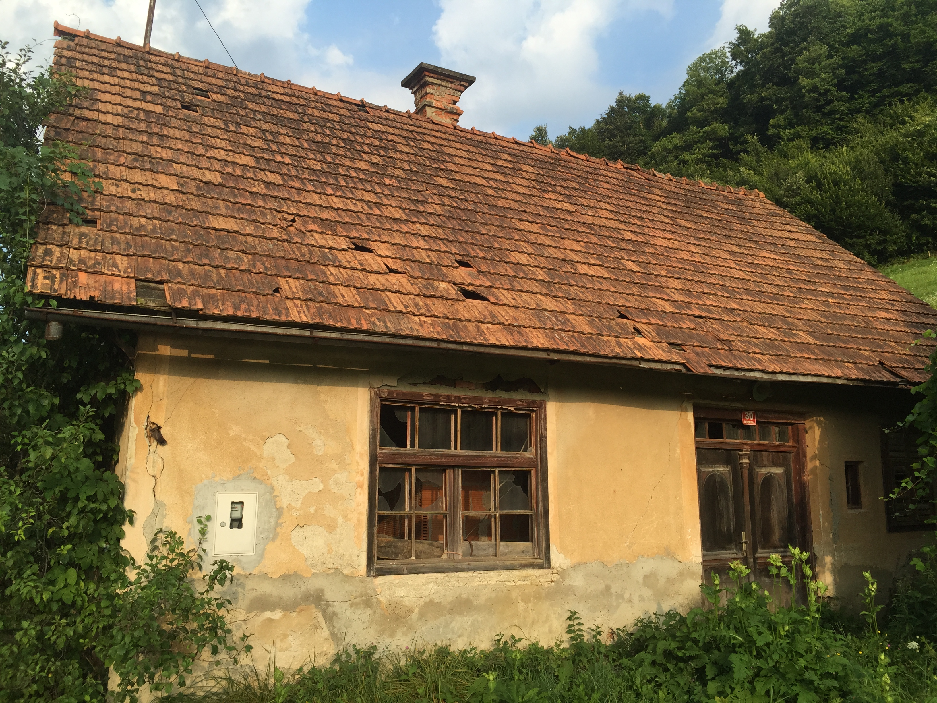 2287 Dobrina, Slovenia